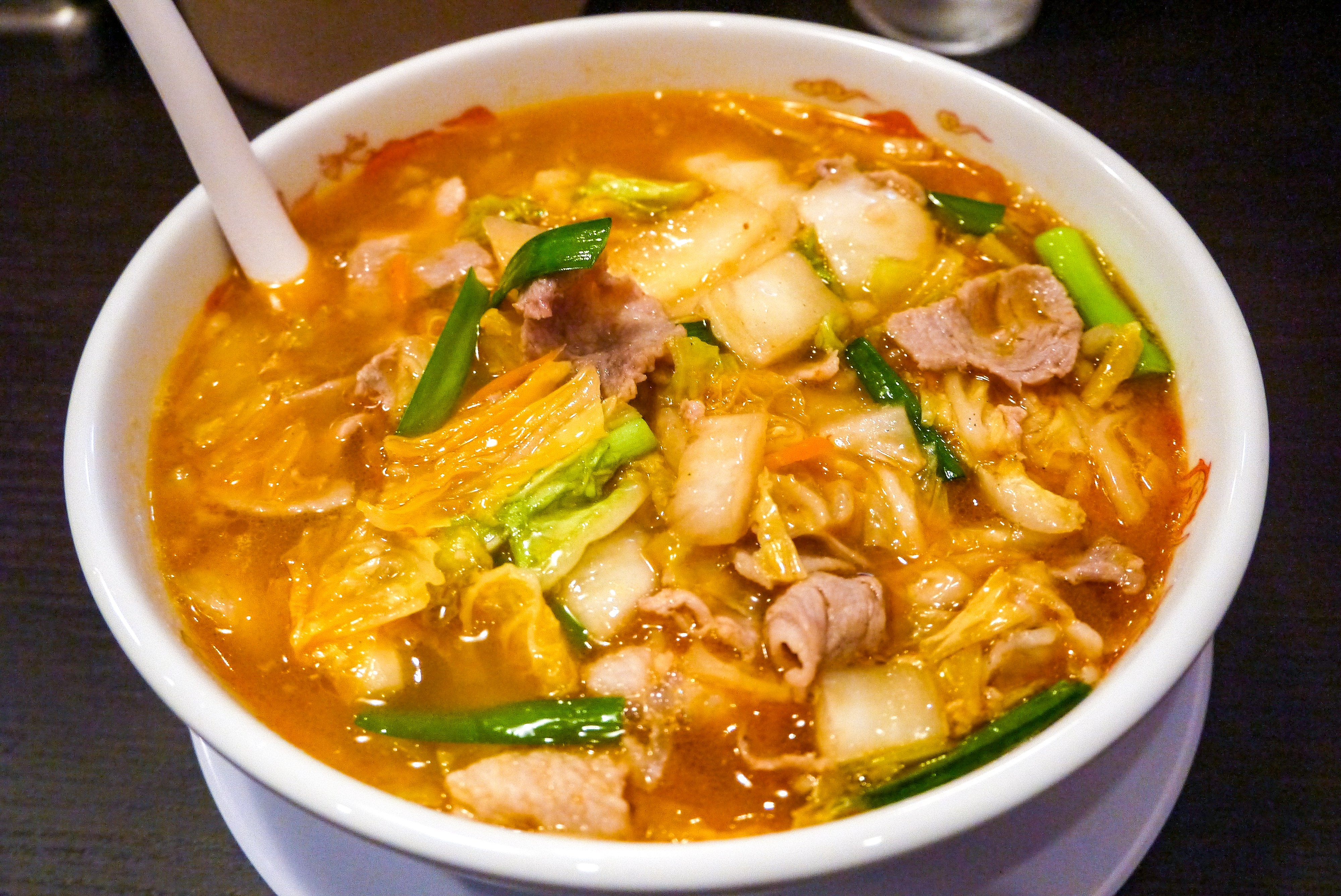 東京都新宿区高田馬場4丁目にあった「天理スタミナラーメン高田馬場店」のスタミナラーメン Panasonic Lumix DMC-GF5